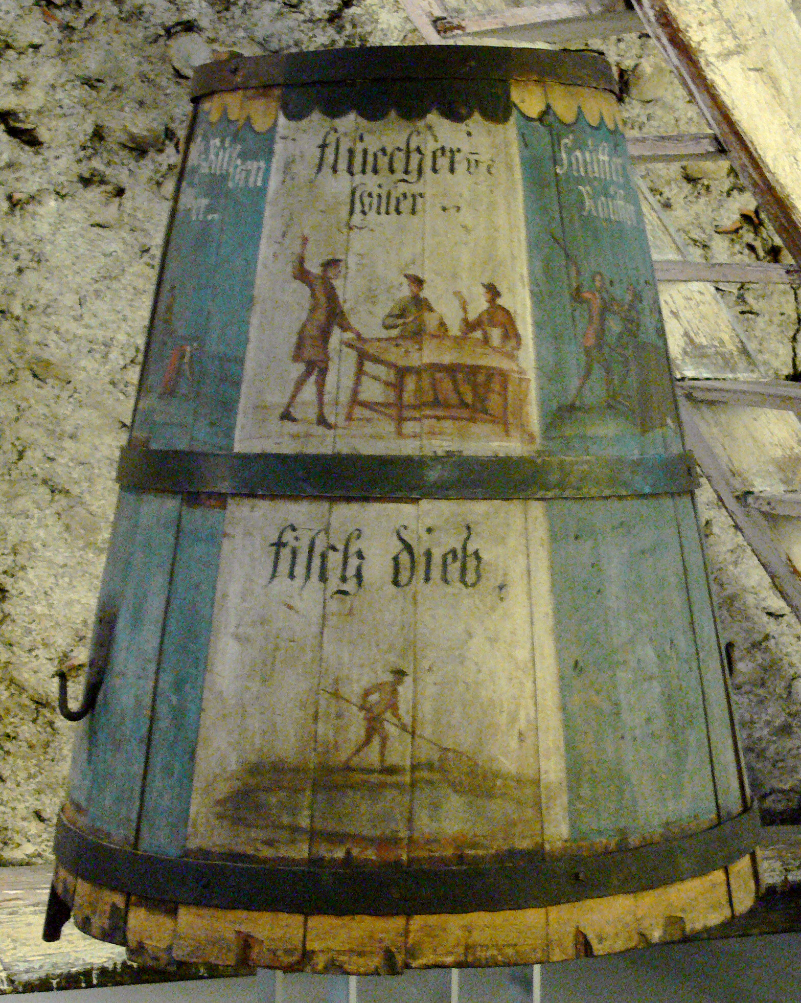 Museum Humpisquartier, Ravensburg Schandmantel, Ravensburg, 18. Jahrhundert Museum Humpis-Quartier Native nameMuseum Humpis-QuartierLocationRavensburg, GermanyCoordinates47° 46′ 50″ N, 9° 36′ 56″ E Established2009Website control : Q1637298 VIAF: 128828875 LCCN: nb2007020847 GND: 4565586-8 WorldCat Frakturschrift rechts/right: Saüffer und Raüffer (Drunkard and Rowdy), mittig/mid: Flüecher Spiler (Swearer Gambler) Fischdieb (Fish Thief), links/left: Krÿtel-Rüben Räuber (Herbs-Beets Robber)